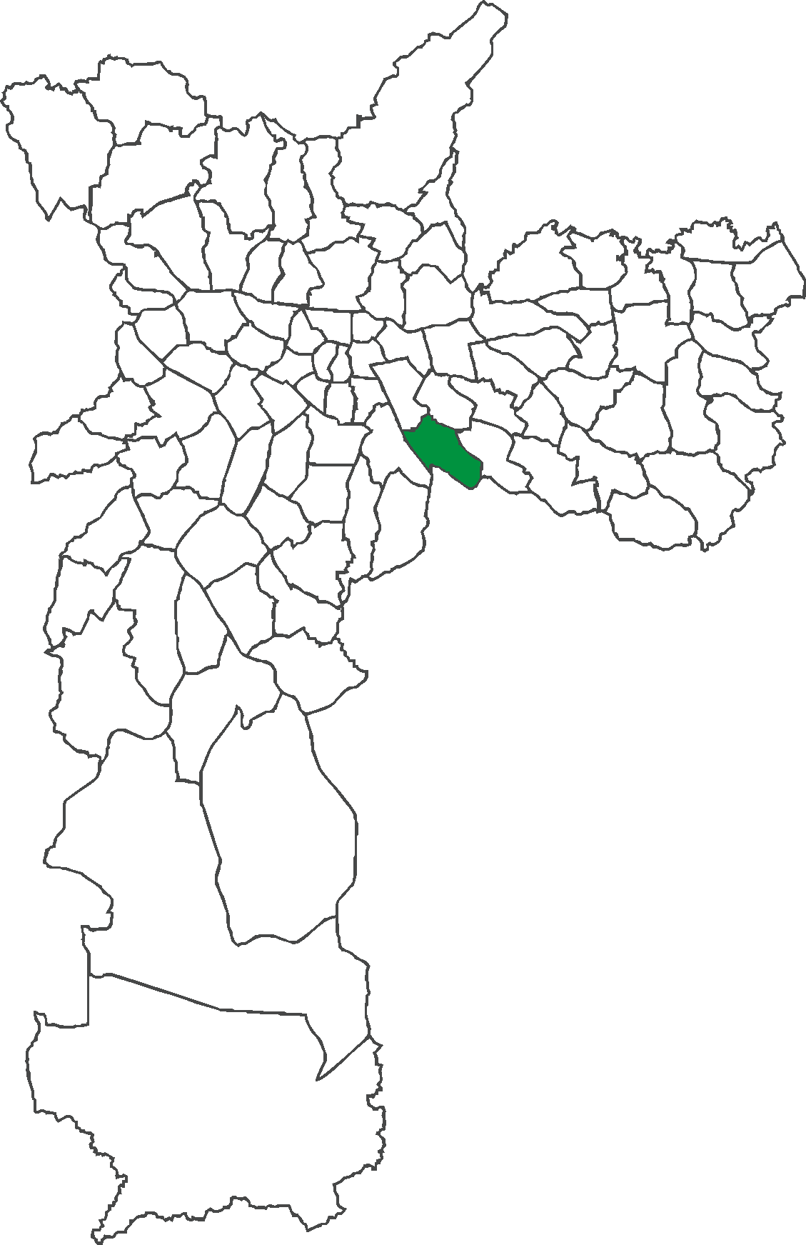 Localização do distrito da Vila Prudente no município de São Paulo.